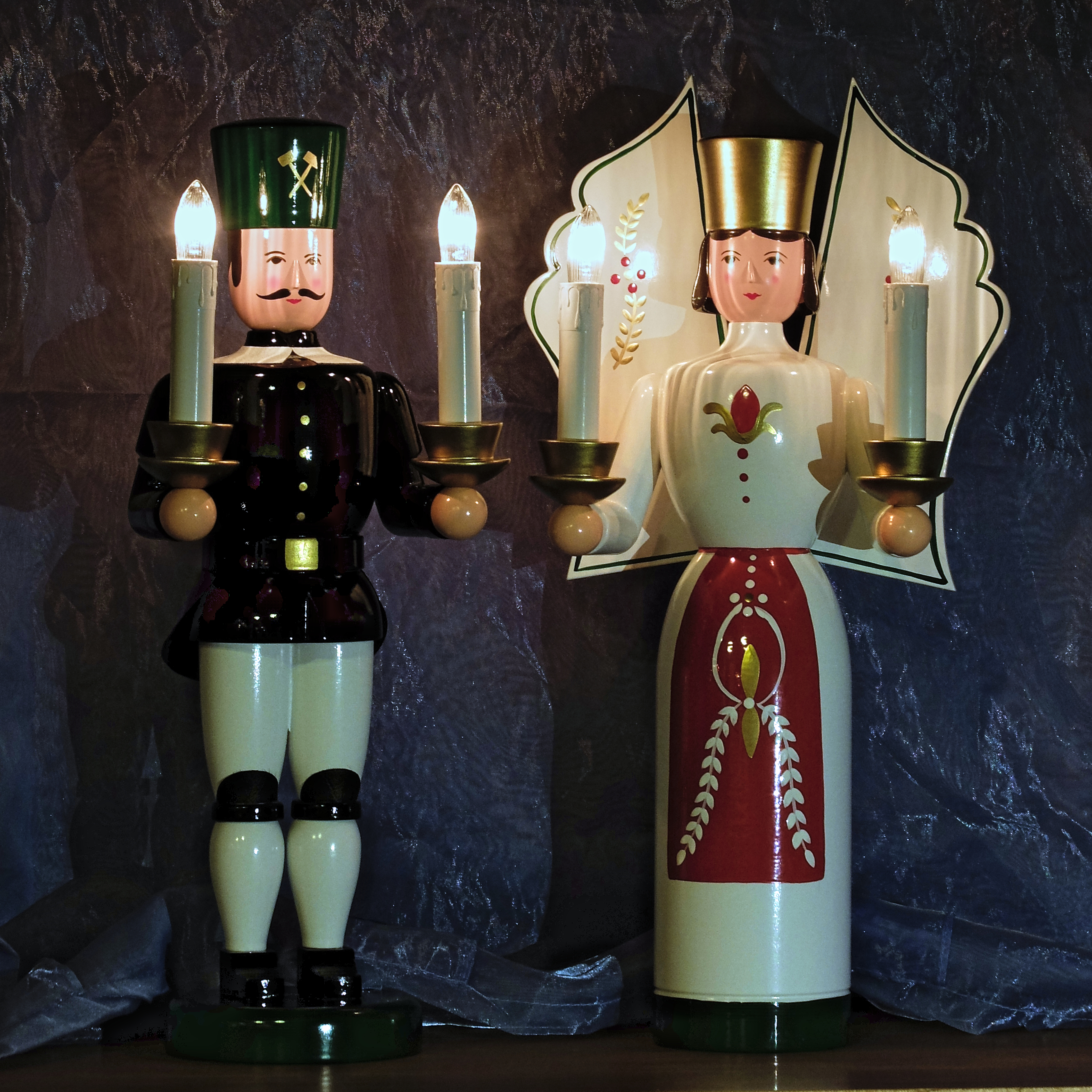 elektrisch beleuchtete Lichterträger - Engel + Bergmann; gedrechselt; produziert 2014